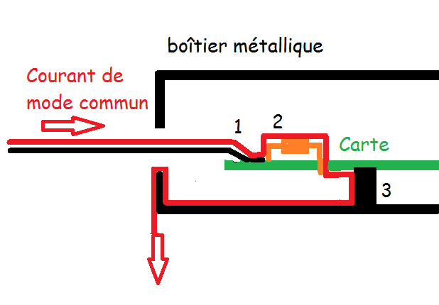 dessin mode commun interieur